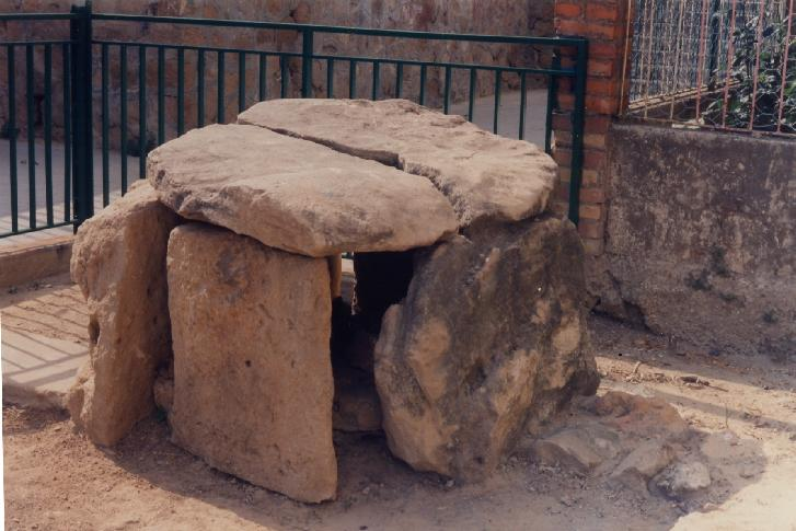 Cista dolmenica situata a Butera (CL), Italia. Immagine by Salvo Piccolo